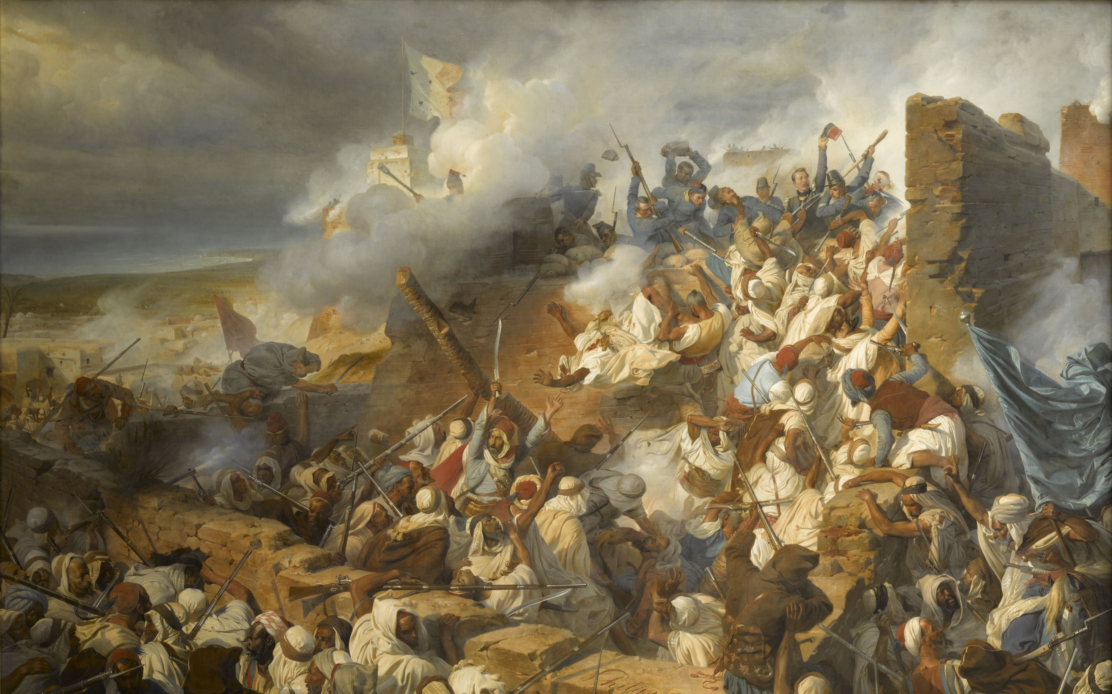 Episode de la conquête de l'Algérie en 1840, La Défense de Mazagran les 4-5-6 Février 1840. Les chasseurs du capitaine Lelièvre et du capitaine Magnier repoussant l'assaut de Mustapha Ben Tami sur les murailles de la ville le 6 février 1840